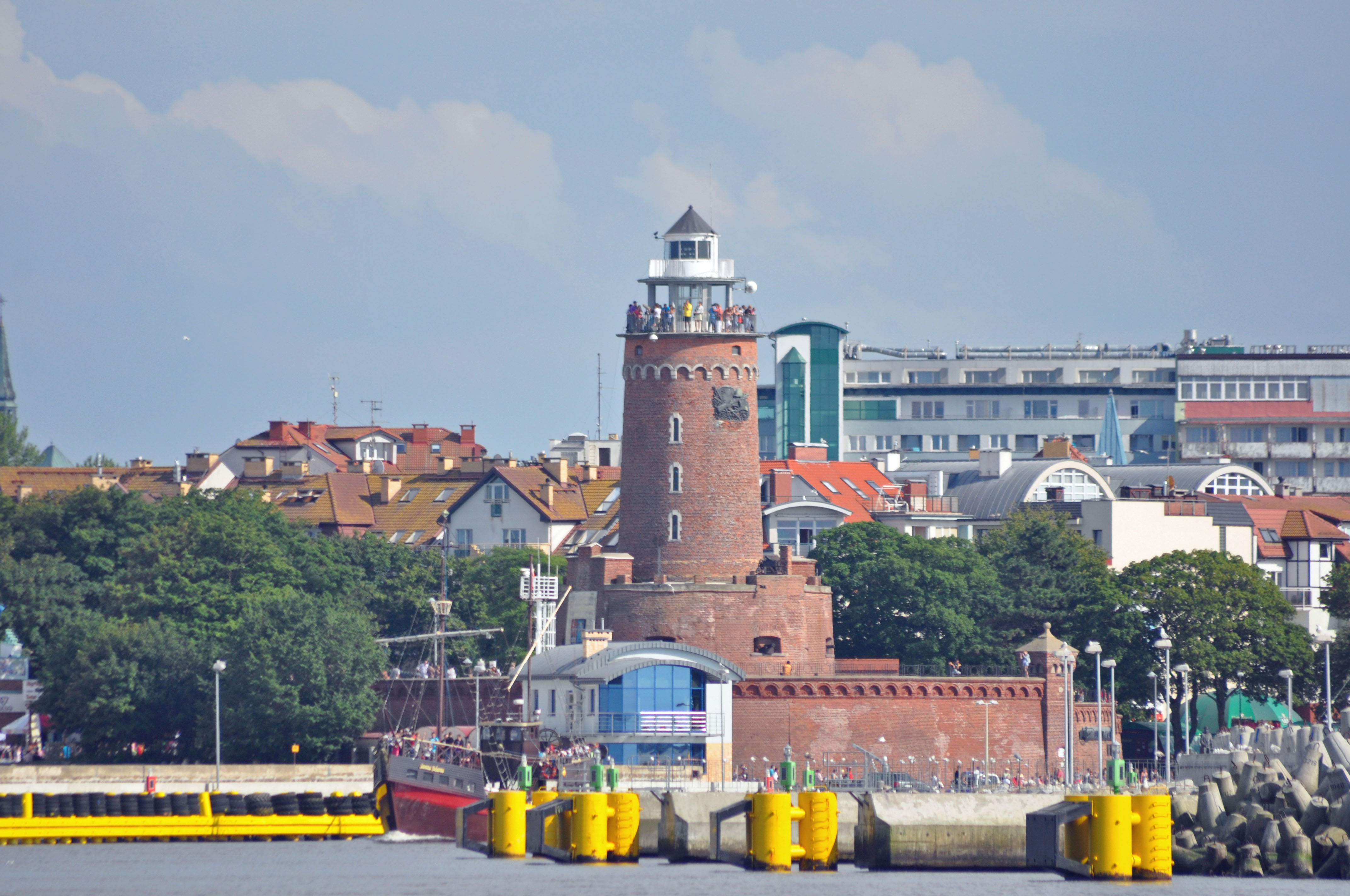 Aufgenommen in Polen im Juli 2011. Die Bilder tragen im Namen Ort und Objekt sowie das Aufnahmedatum.